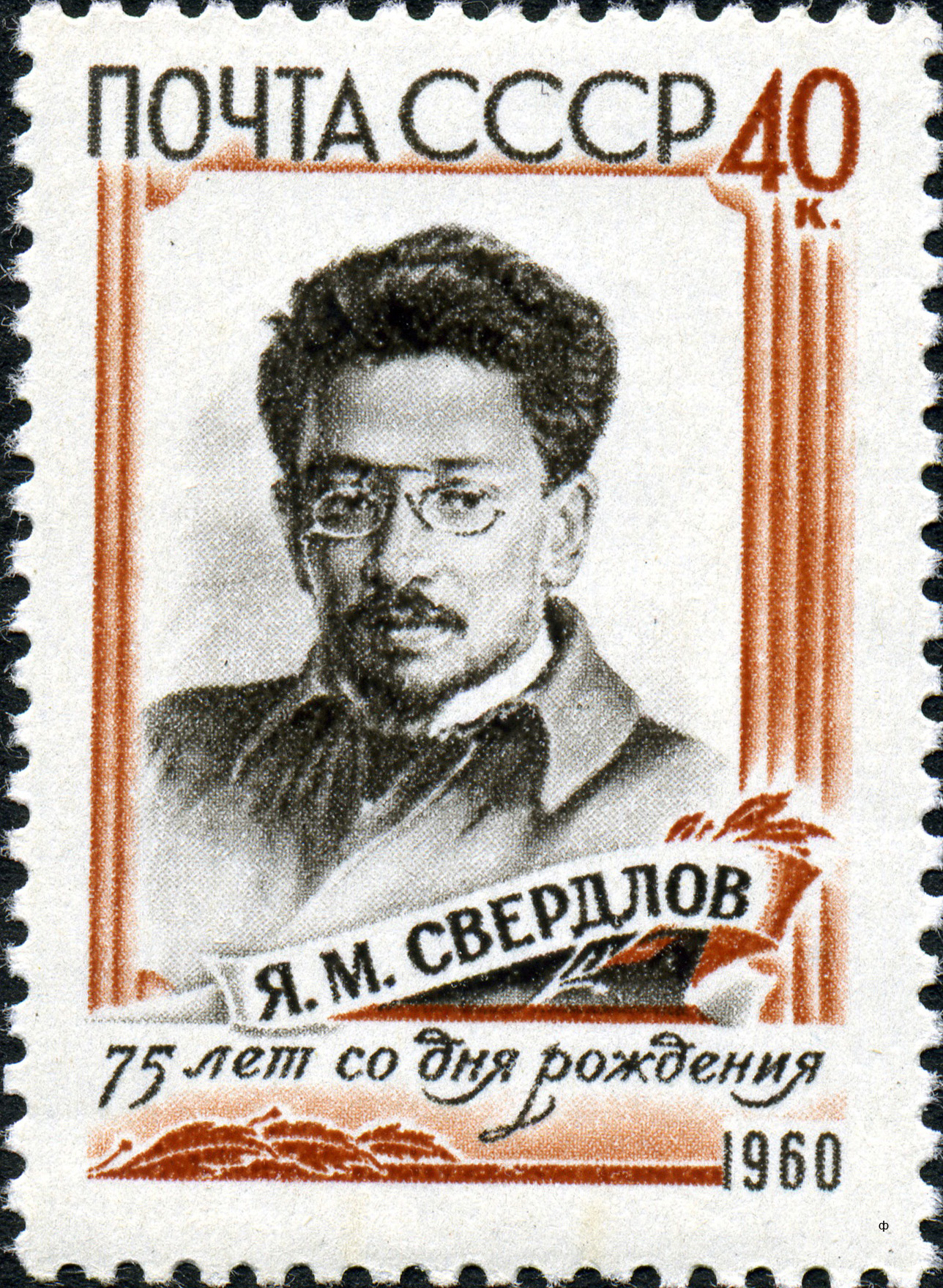 Марка СССР